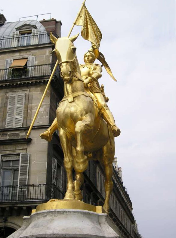 Statue de Jeanne d'Arc sur la place des Pyramides à Paris. Commettant Daniel Iffla (1889) Date : Août 2004 Photographe amateur : Photographie prise par François Trazzi